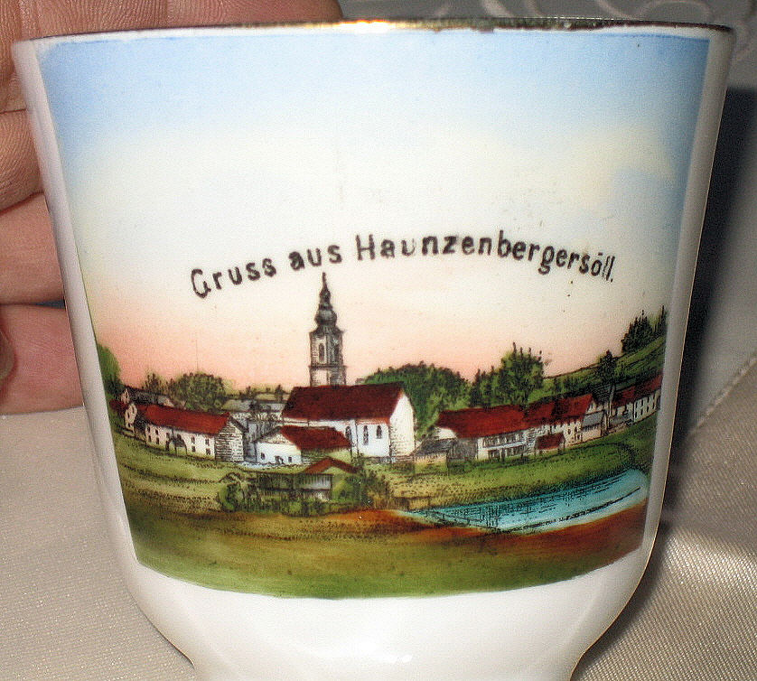 Haunzenbergersöll 1900 Gruß Tasse Ansicht Dorf Kirche